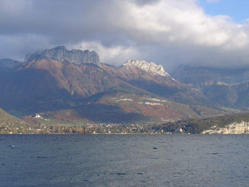 Menthon-Saint-Bernard, vue de Sévrier. Novembre fr:2004. Au premier plan, le lac d'Annecy, au milieu la commune de Menthon-Saint-Bernard, à gauche on distingue le château de Menthon-Saint-Bernard. Juste au dessus les dents de Lanfon, à leur droite, les Lanfonnets. Complètement à droite au niveau du lac, c'est le début du roc de Chère.